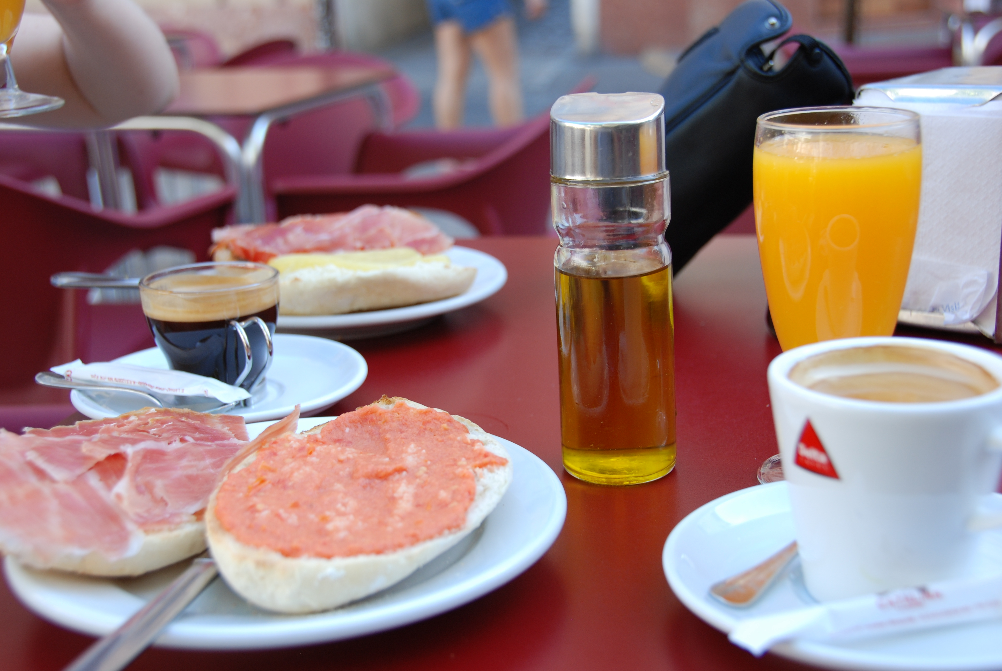 Desayuno en un bar de Sevilla, con café solo y cortado, zumo de naranja, aceite de oliva y molletes abiertos de jamón y tomate.